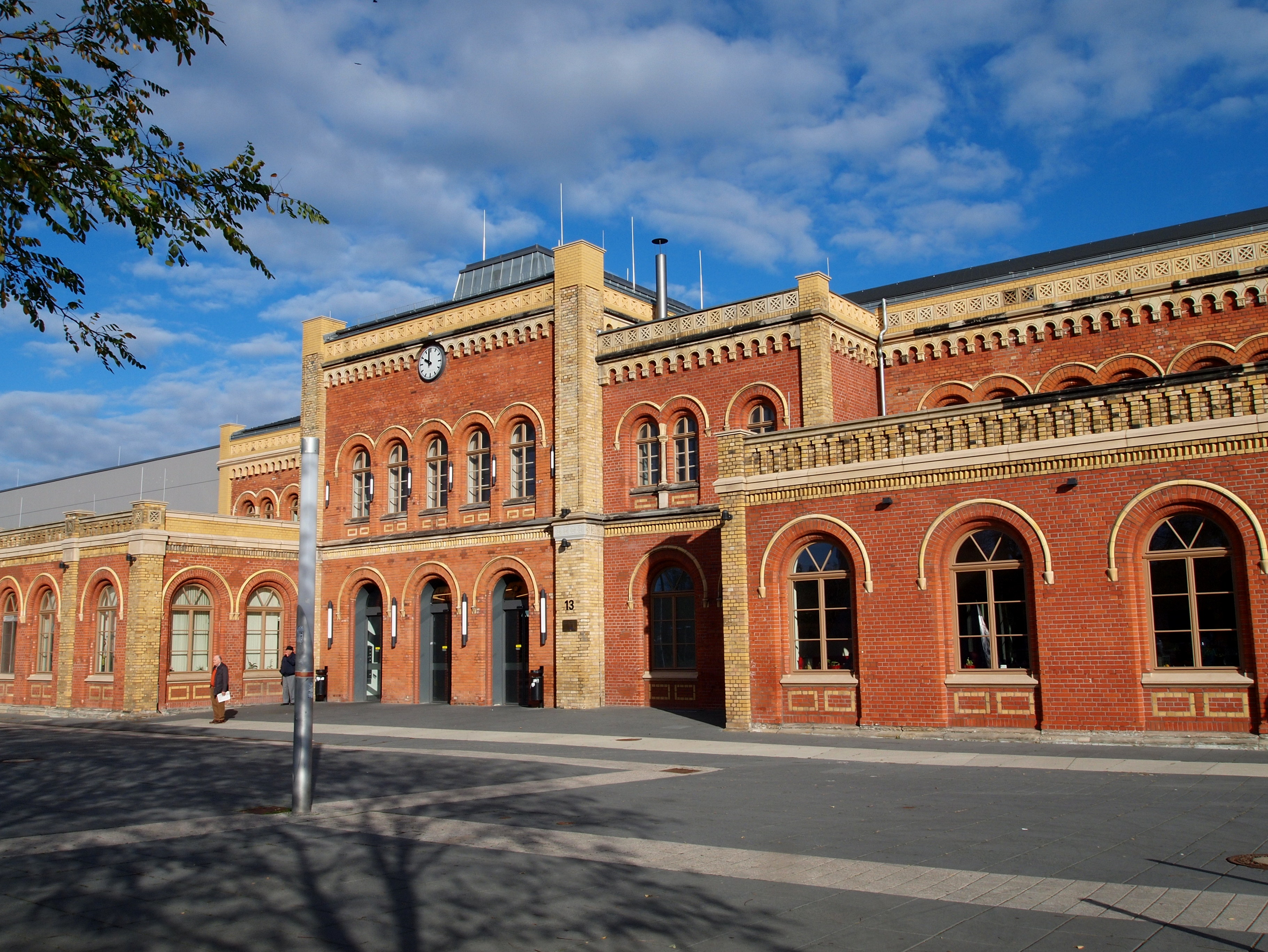 Halberstadt (Landkreis Harz, Sachsen-Anhalt) Hauptbahnhof Front